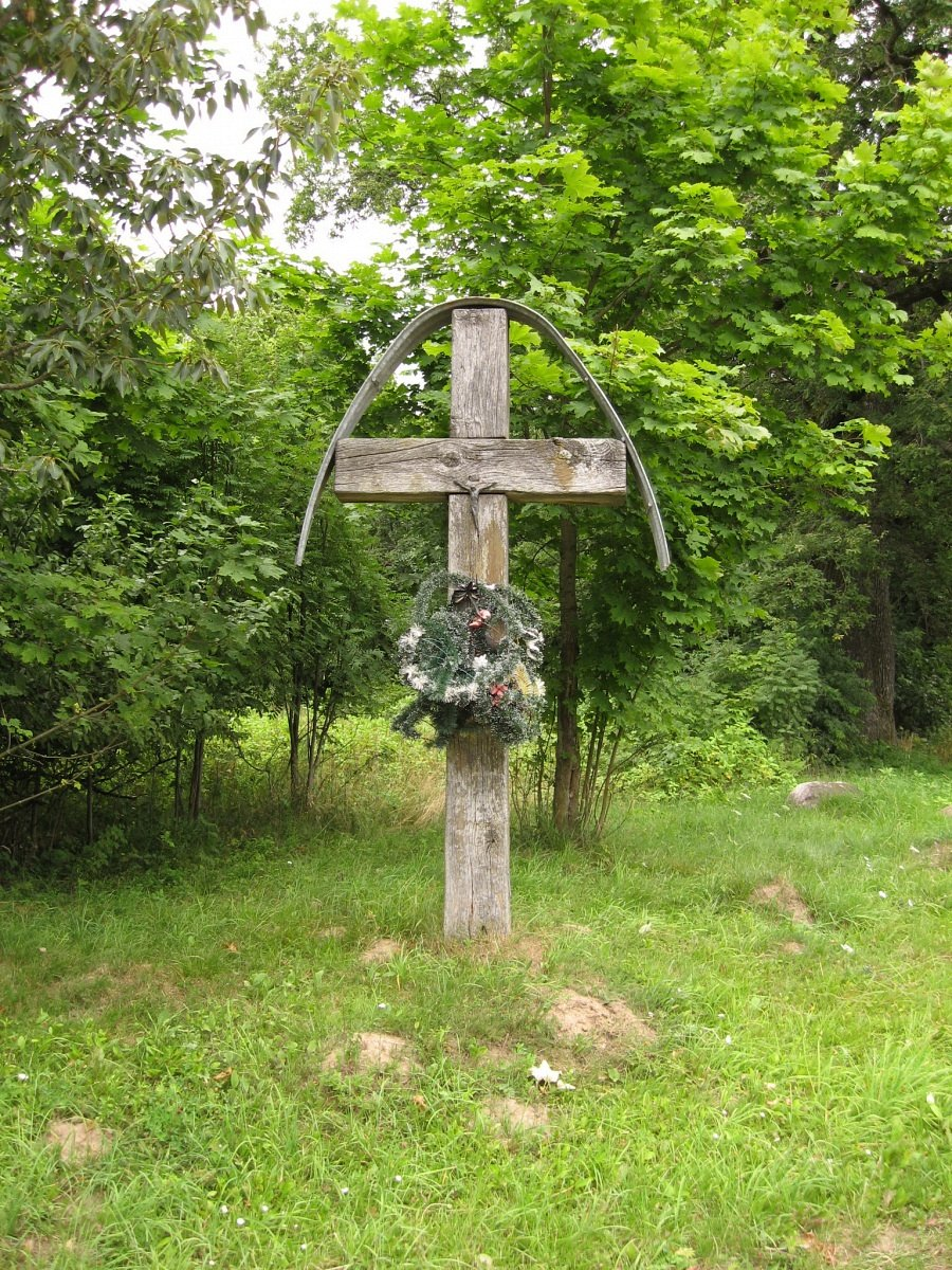 Цюпішкі. Крыж